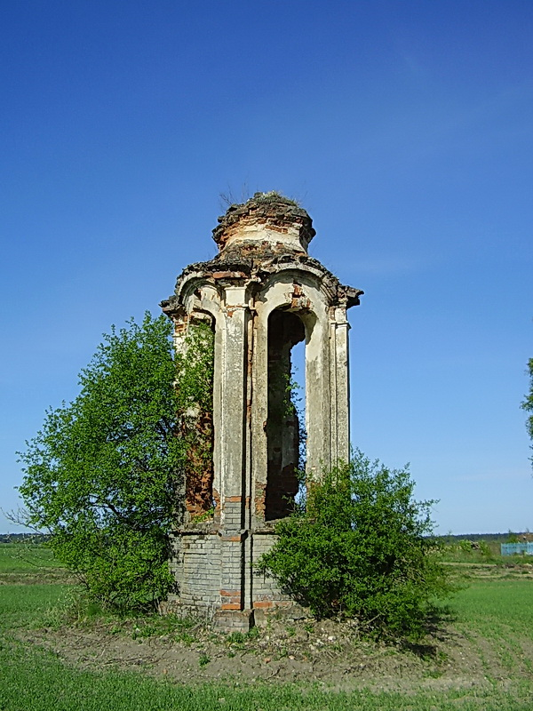 Ручыца. Капліца